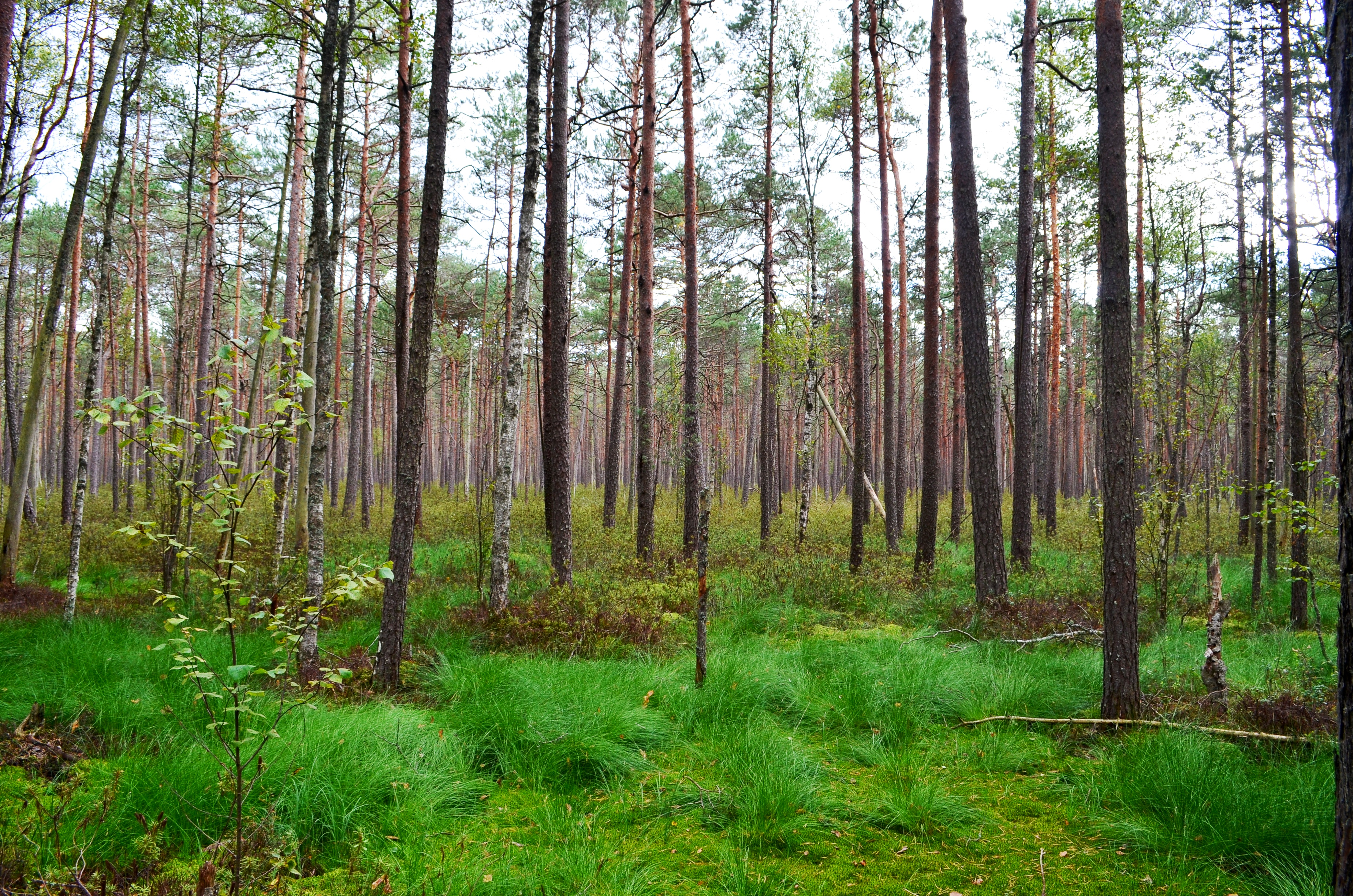 Aukštapelkė Labanoro girioje netoli Paibutiškio, Labanoro sen., Švenčionių raj.